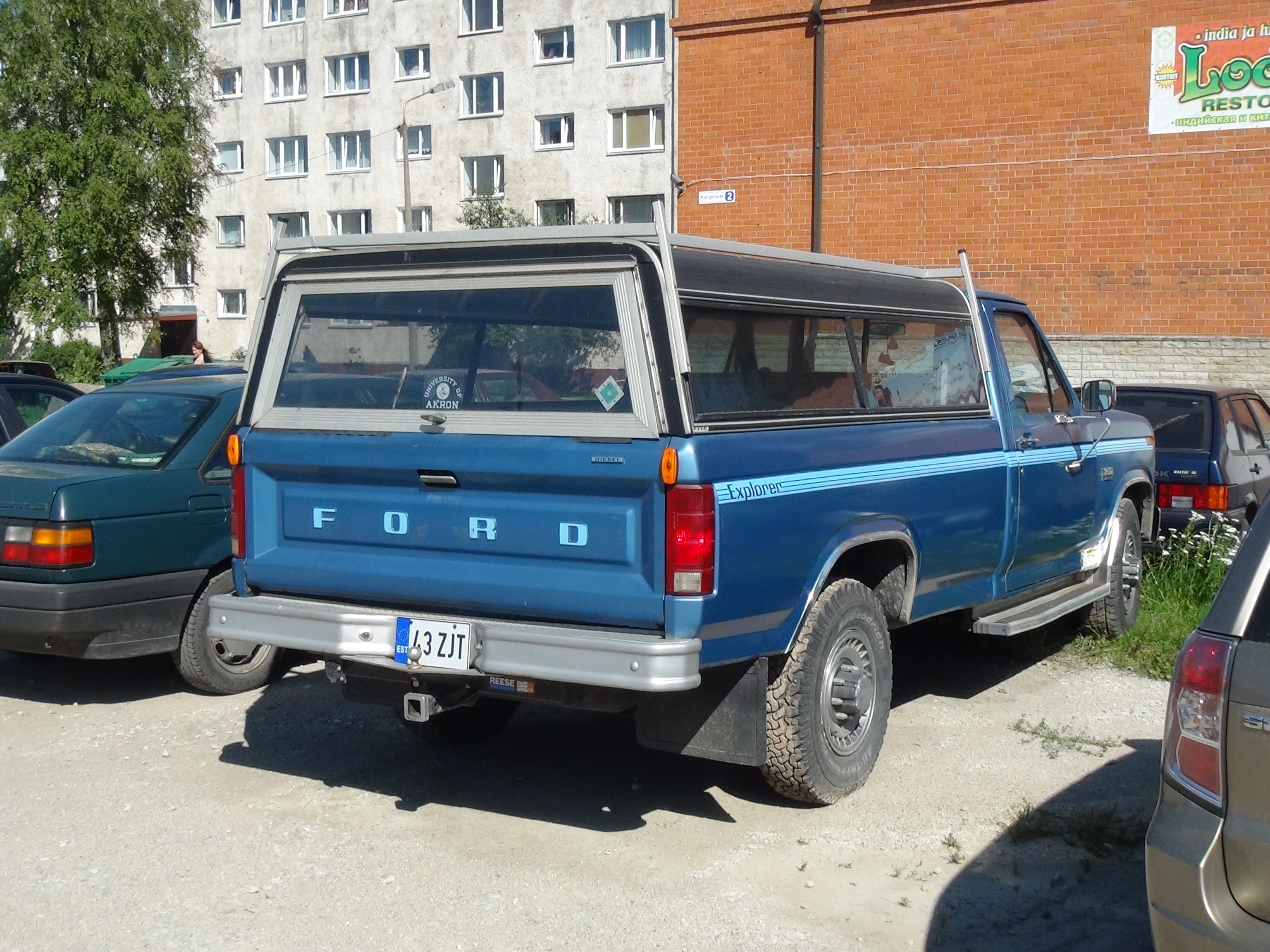 автомобиль Ford Explorer